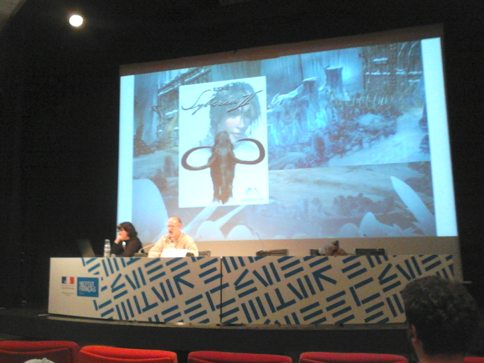 Επίσκεψη του Benoît Sokal στο Γαλλικό Ινστιτούτο στο πλαίσιο του Φεστιβάλ κόμικς 2017